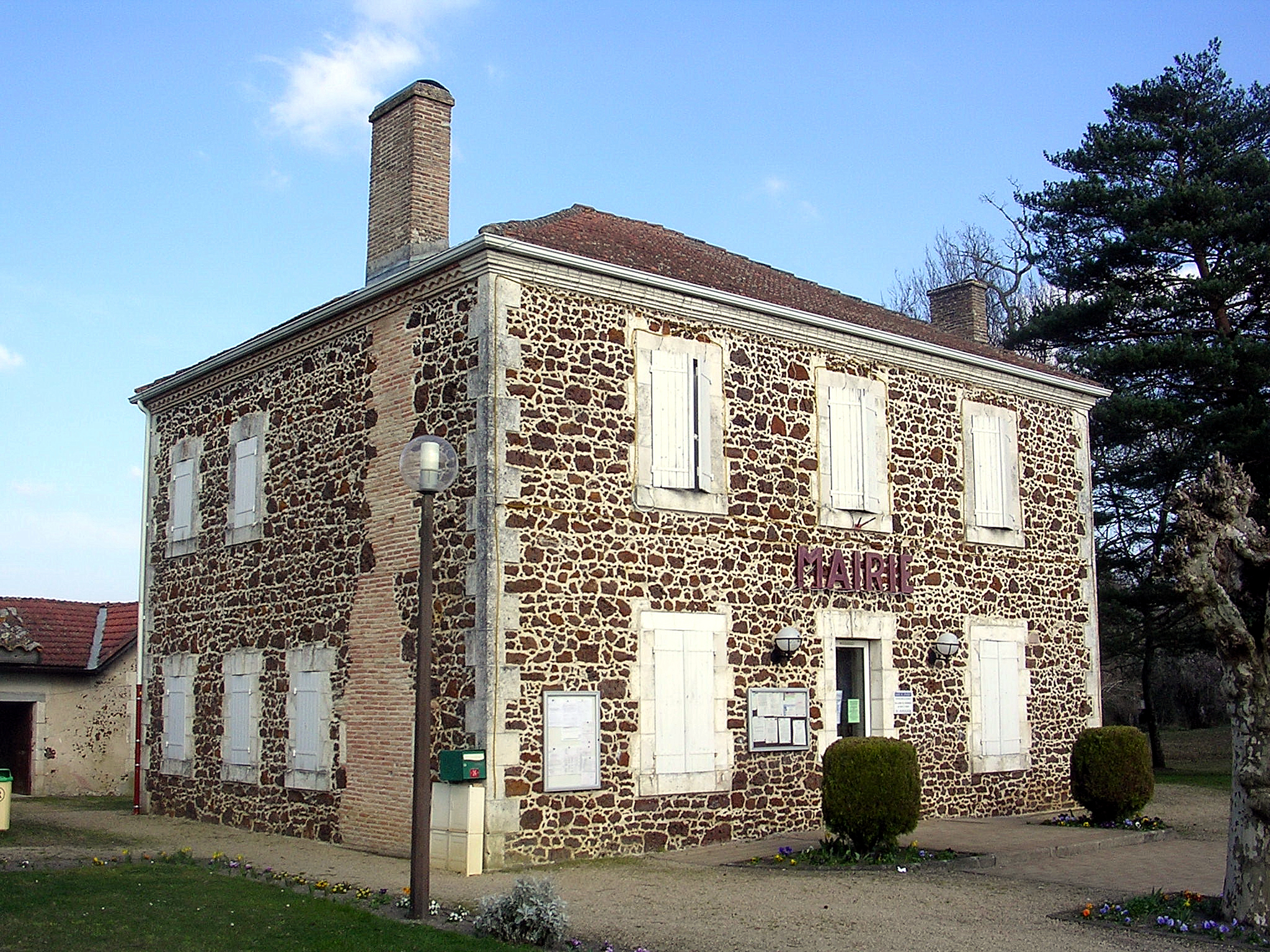 Mairie de Liposthey, dans le département français des Landes